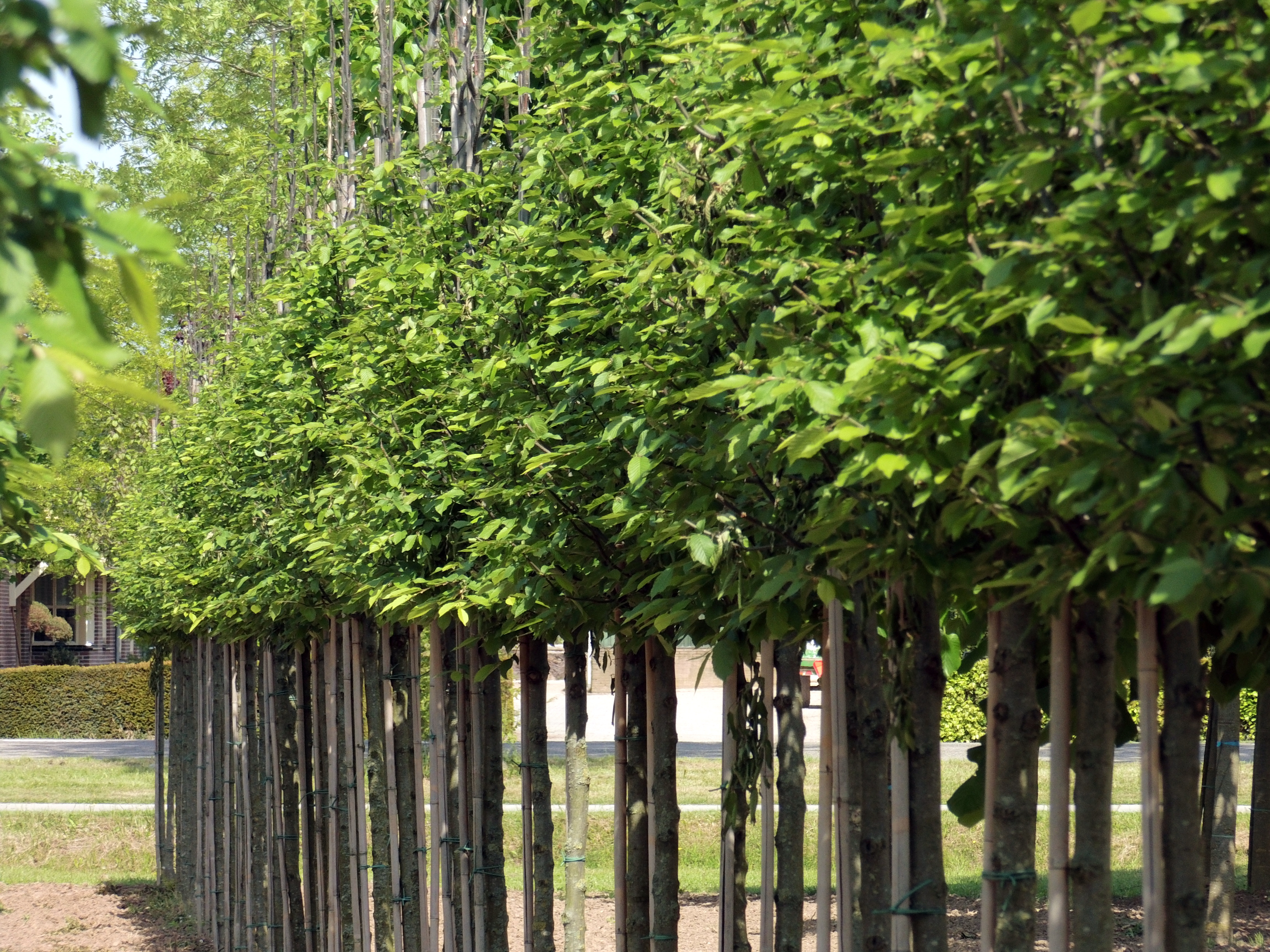 Boomkwekerij